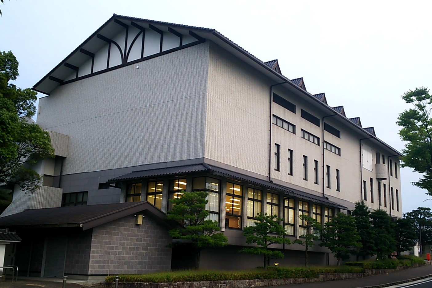 愛知県豊田市にある豊田市高岡コミュニティセンター・豊田市役所高岡支所。